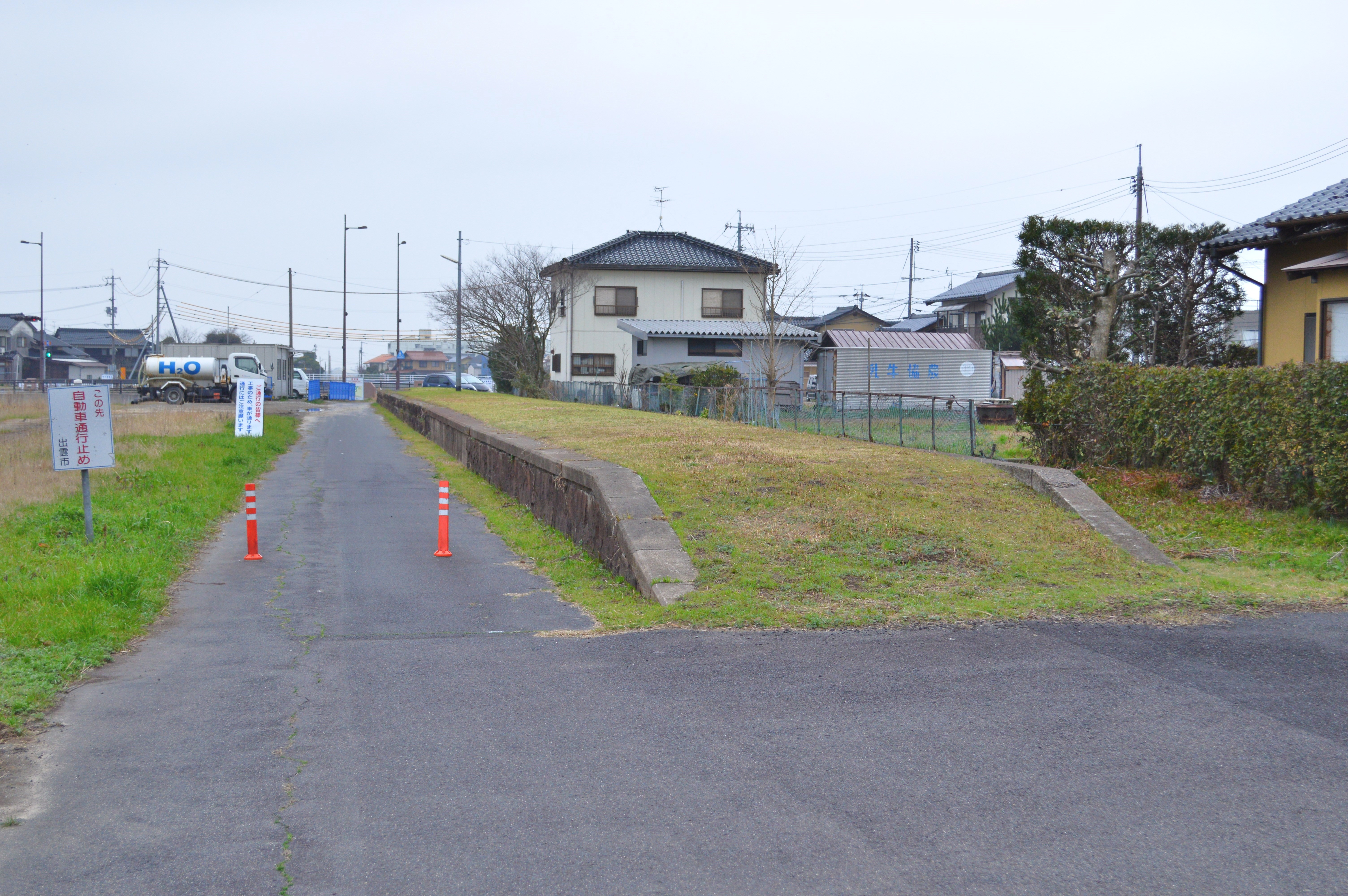 旧出雲高松駅 ホーム跡